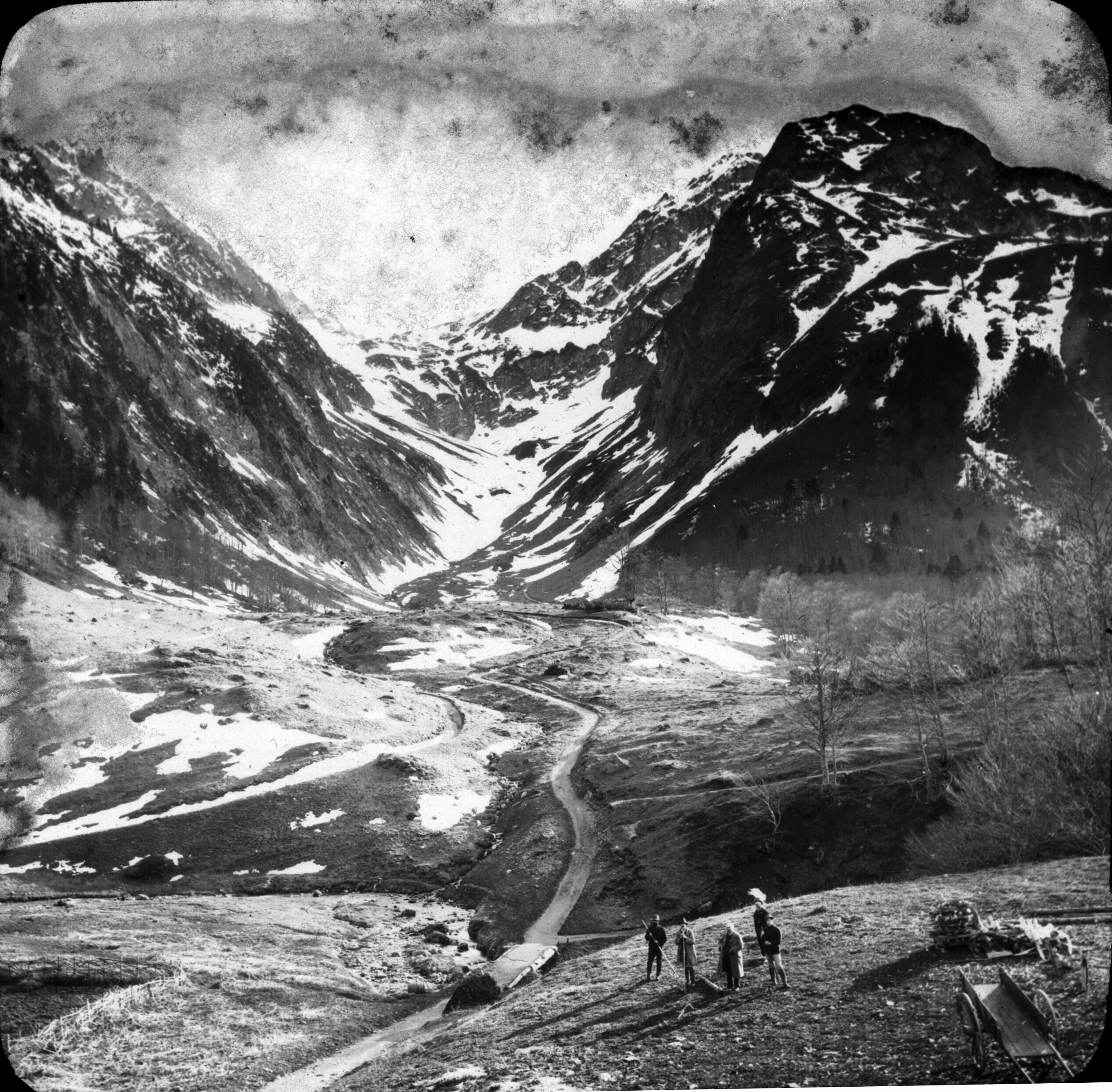 Fonds Trutat - Photographie ancienne Cote : TRU C 335 Localisation : Fonds ancien Original non communicable Titre : Le port de Venasque, Luchon Auteur : Trutat, Eugène Rôle de l’auteur : Photographe Lieu de création : Bagnères-de-Luchon (Haute-Garonne ; canton) Date de création : : 19e siècle, 4e quart Mesures : 10 x 9 cm Mot(s)-clé(s) : -- Montagne -- Sommet (montagne) -- Chemin -- Pont -- Neige -- Charrette -- Bagnères-de-Luchon (Haute-Garonne ; canton) -- Venasque, Port de (France ; col) -- Pique (France ; haute-vallée) -- Luchonnais, Massif du (France) -- 19e siècle, 4e quart Médium : Photographies Médium : Positifs sur plaque de verre -- Noir et blanc -- Positifs au collodion sur plaque de verre -- Paysages de montagne Bibliothèque de Toulouse. Domaine public